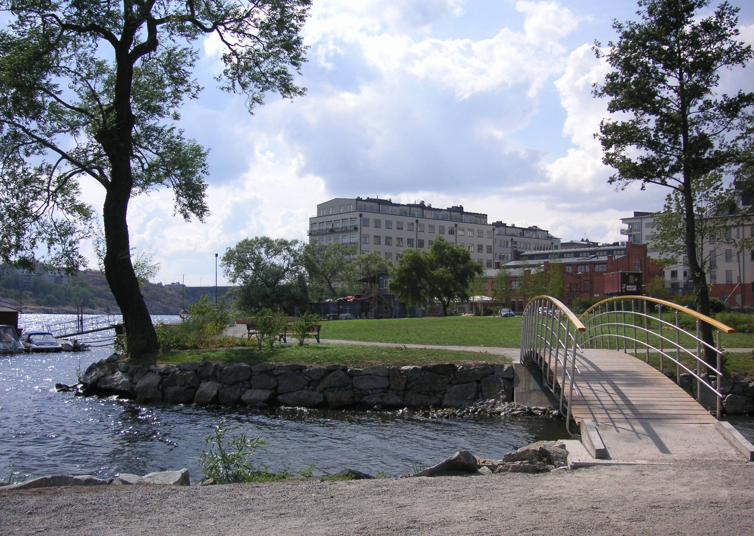 Luxparken på Lilla Essingen, Stockholm